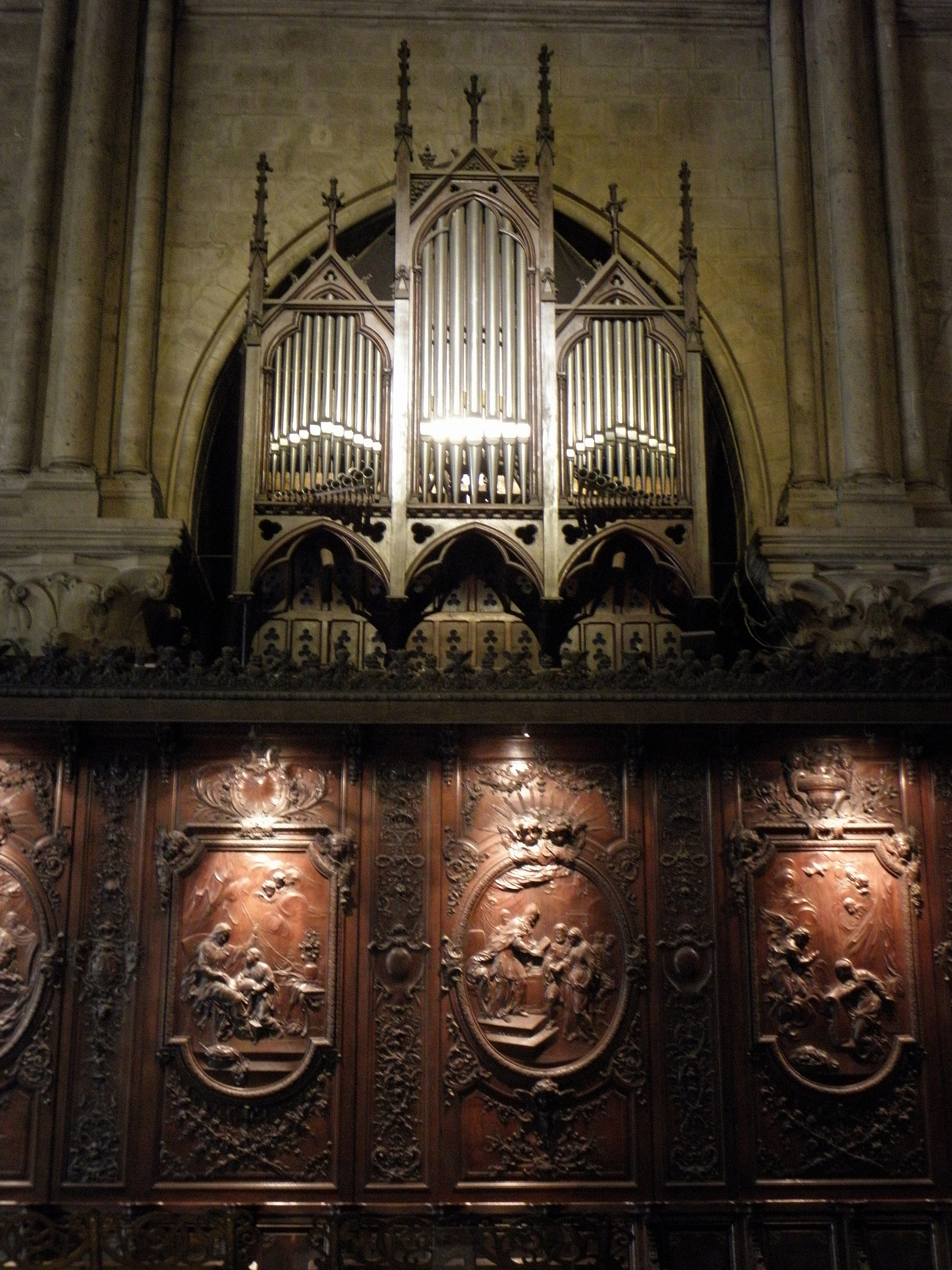 Stalles et orgue de choeur de la cathédrale Notre-Dame de Paris.